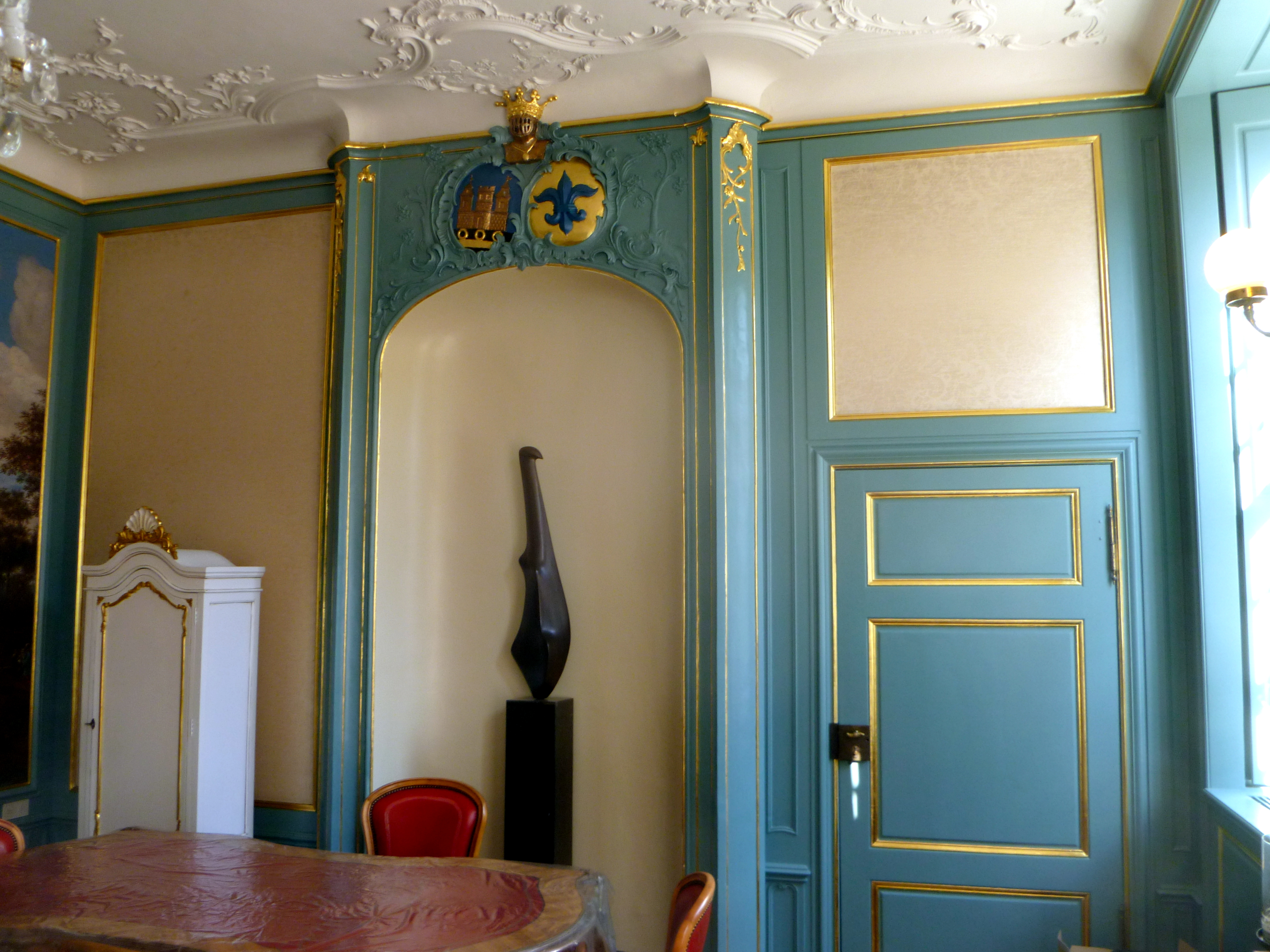 Innenraum im Huis Clermont in Vaals mit Kamin und Stuckverzierungen sowie Wappen von Johann Arnold von Clermont und seiner Gattin Maria Elisabeth Emminghaus